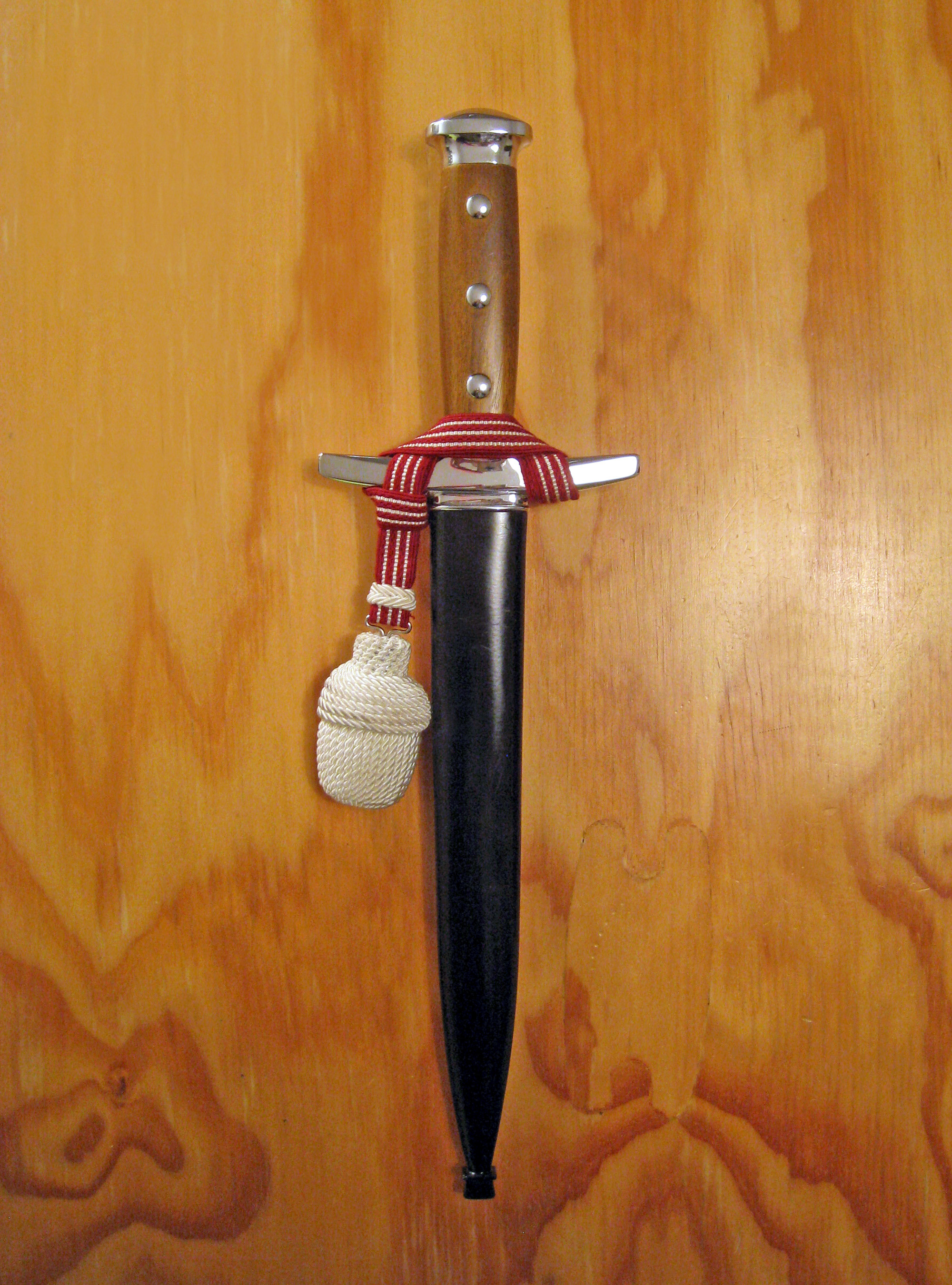 Der Dolch 43 für Offiziere und höhere Unteroffiziere wurde mittels Bundesratsbeschluss vom 4. November 1943 per 1. Januar 1944 eingeführt und ersetzte die Säbel und Degen. Hersteller Elsener Schwyz und SIG Neuhausen. Der Dolch verfügt über dreifach verschraubte Holzgriffschalen und eine zweischneidige Klinge ohne Hohlkehle. Die aus Stahlblech hergestellte Scheide ist schwarz lackiert. Die Schlagbänder für Offiziere sind weiss, die Schlagbänder für höhere Unteroffiziere sind rot/weiss.